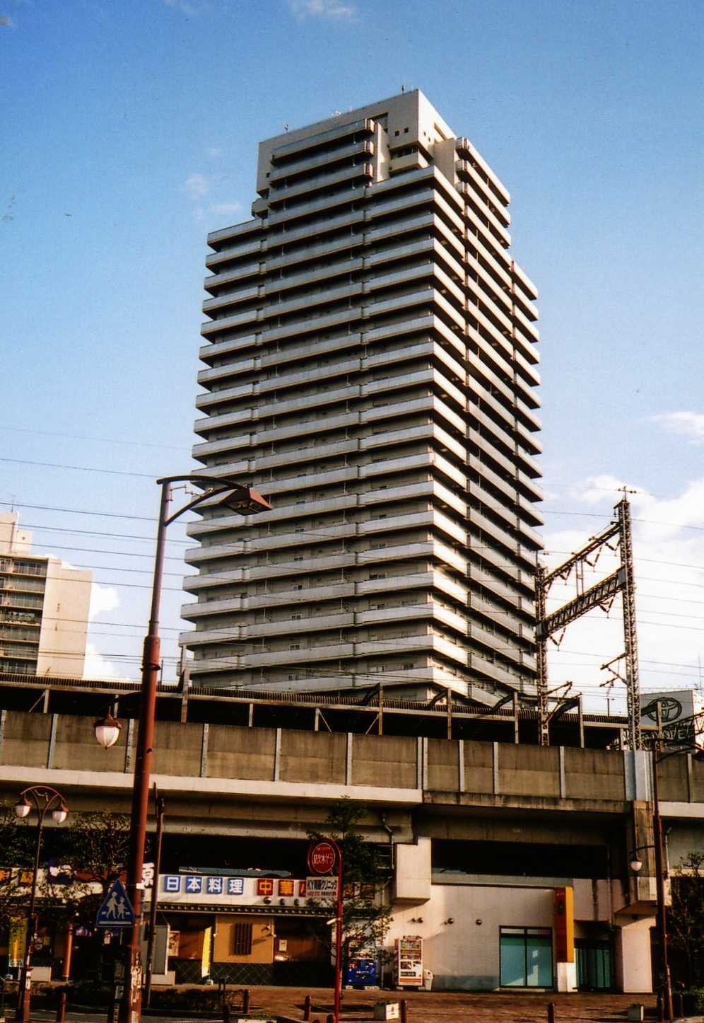 埼玉県さいたま市中央区の高層マンション「ポルテ29」2008年12月中旬に利用者が撮影